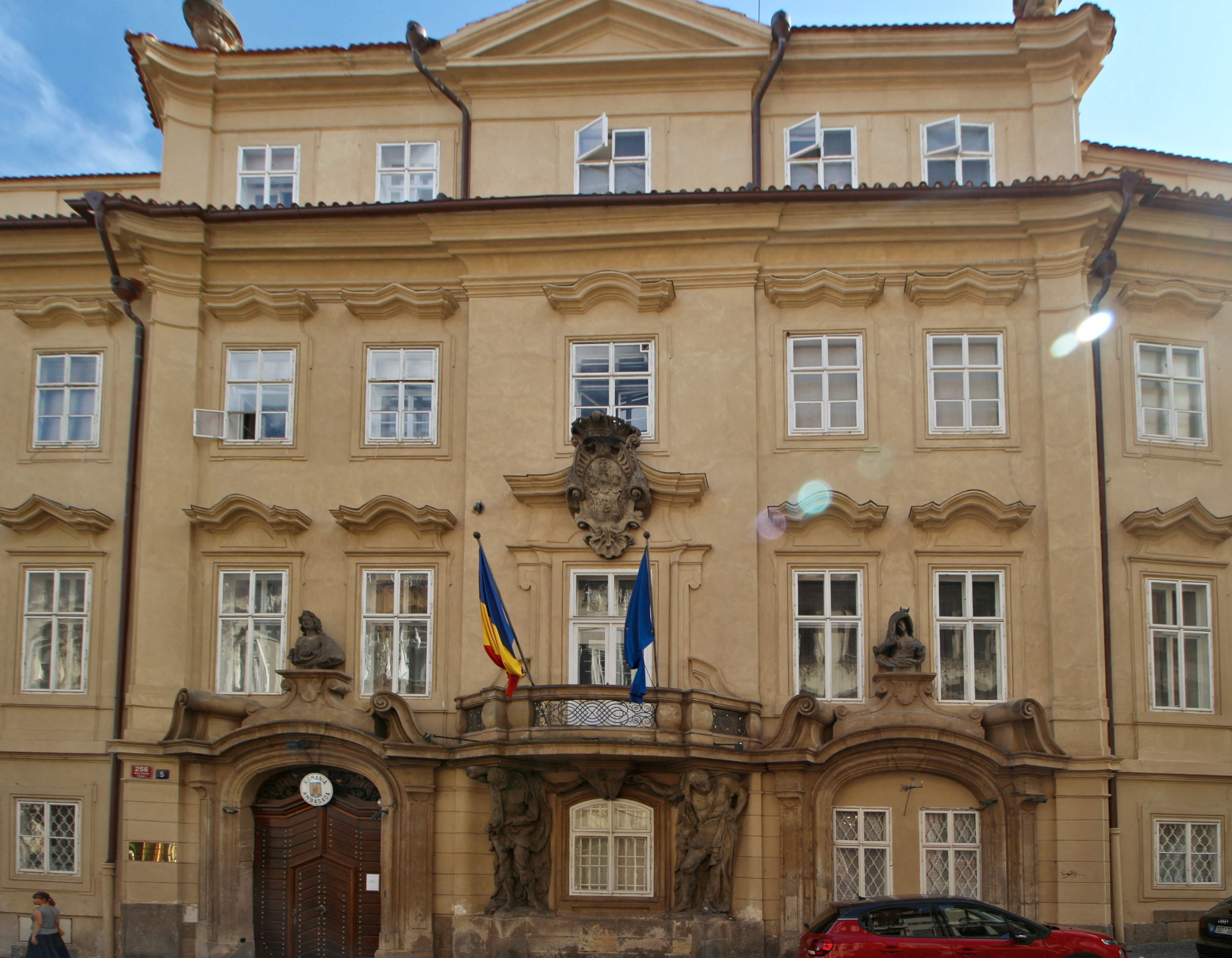 Praha 1-Malá Strana, Nerudova ulice